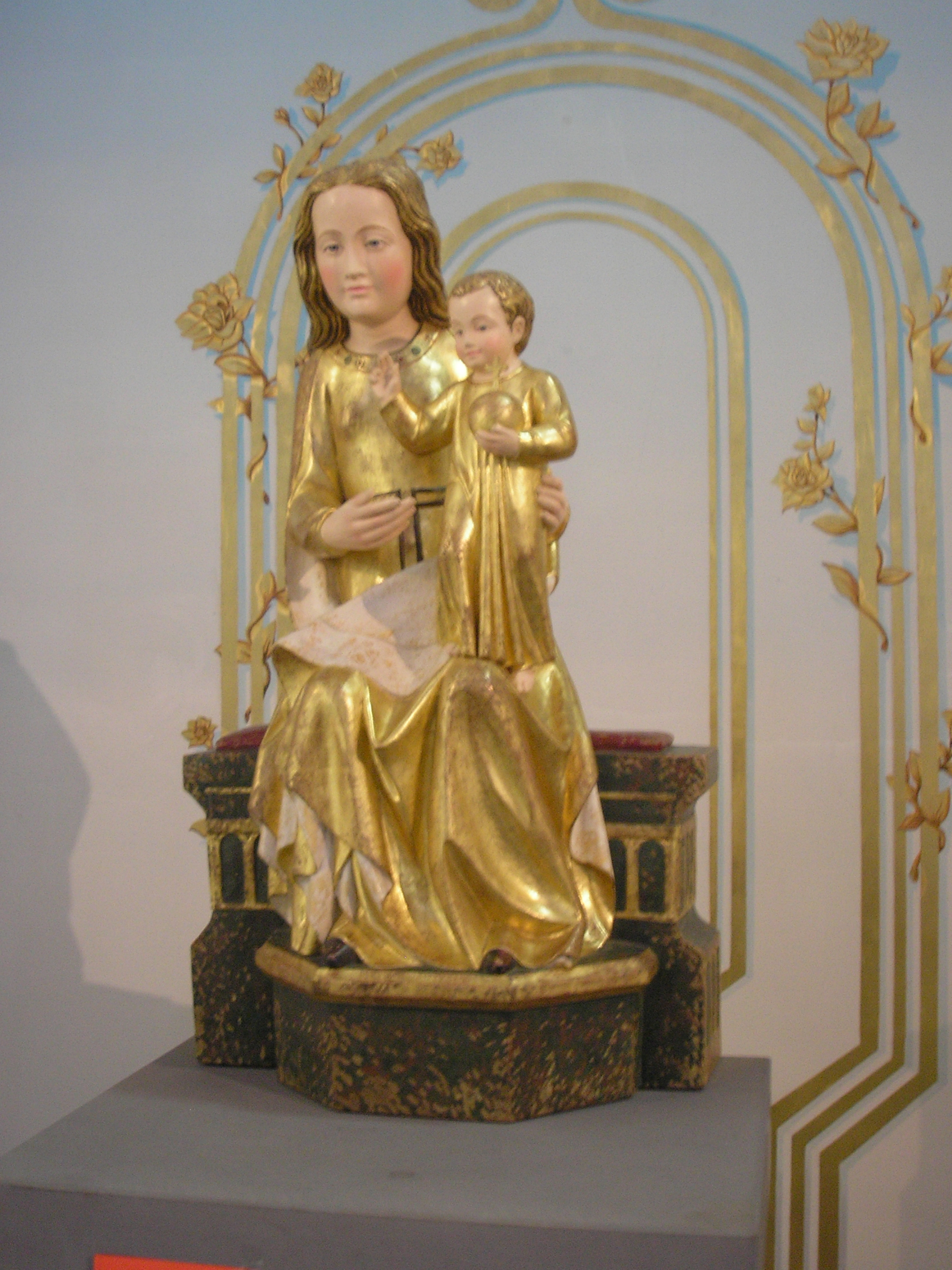 Dattenfelder Madonna im Siegdom. Am 10.Juni 2006 wurde die Madonna von Joachim Kardinal Meisner geweiht.